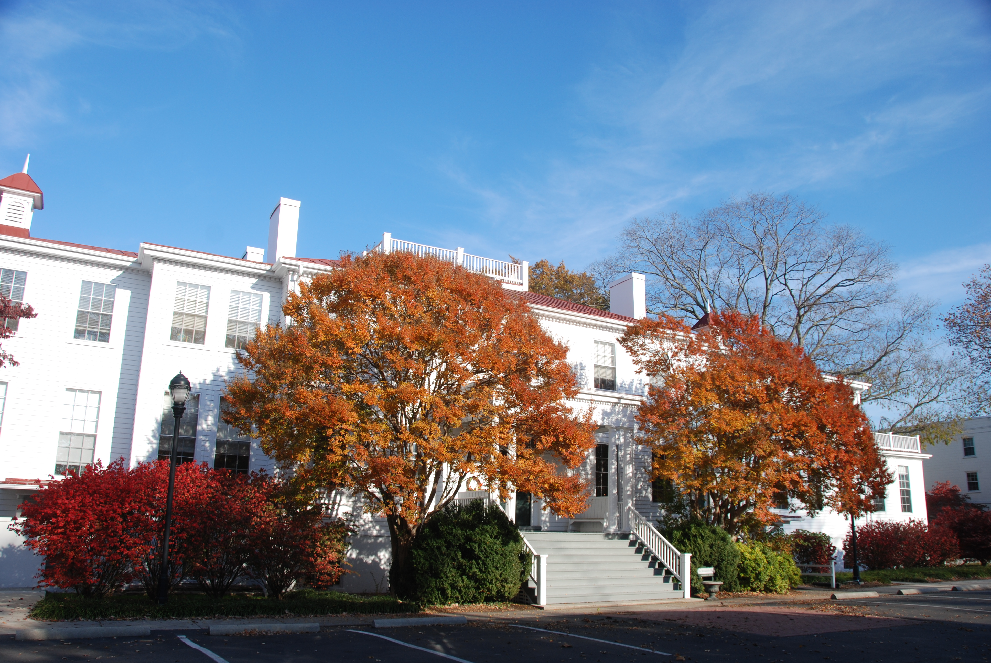 St. Margaret's Hall - Tappahannock VA